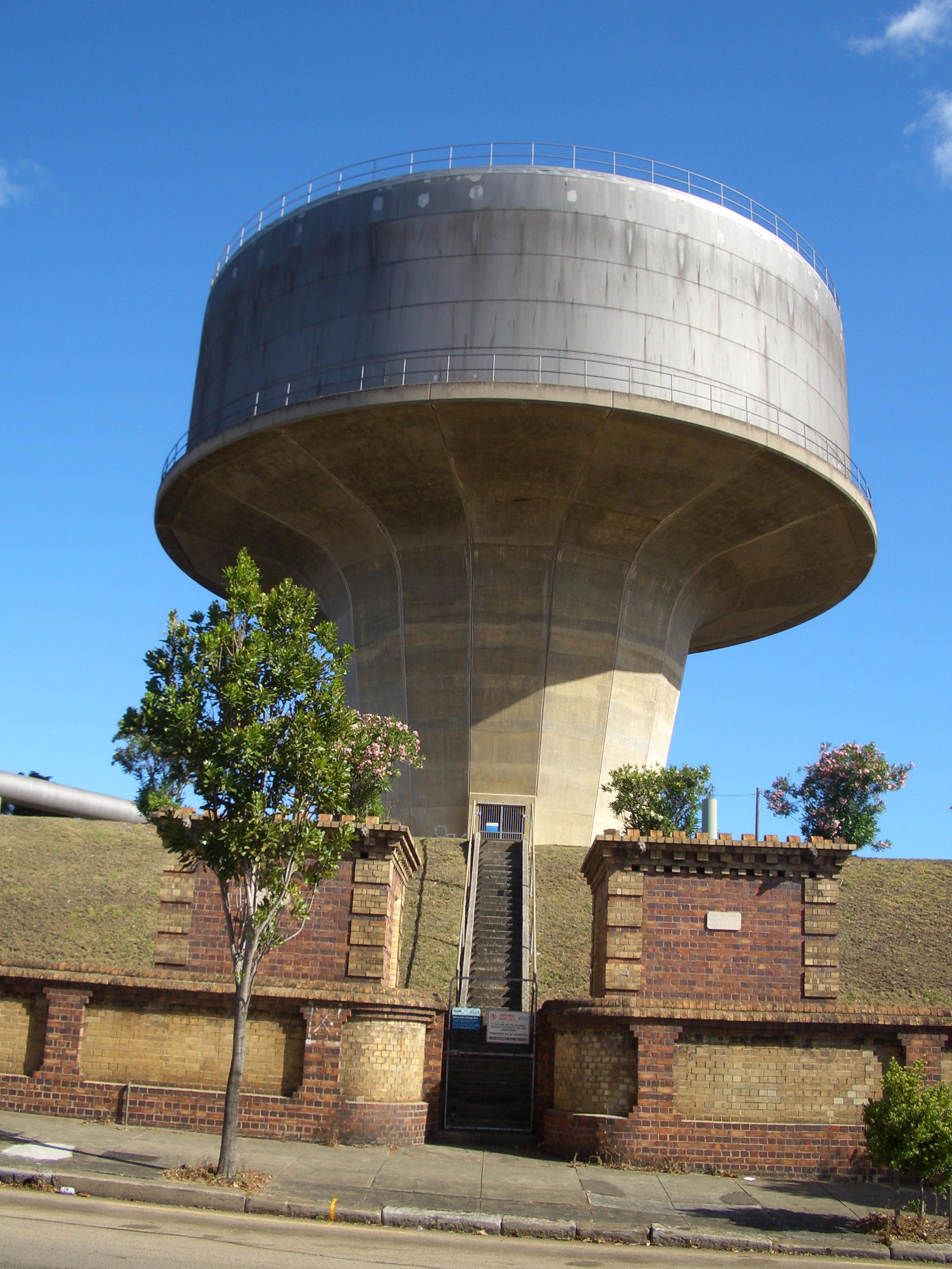 Petersham